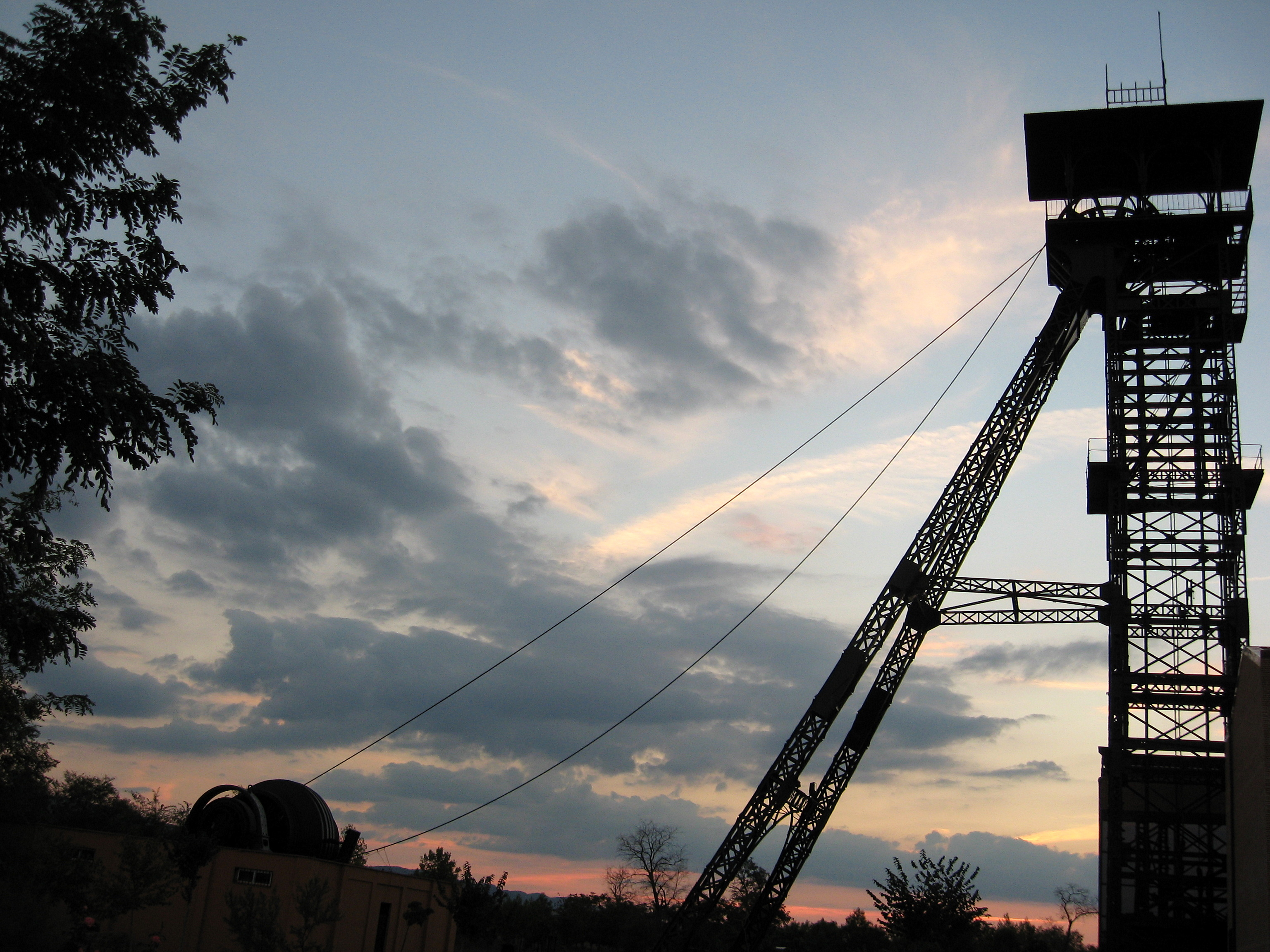 CASTILLETE SANTA MARIA